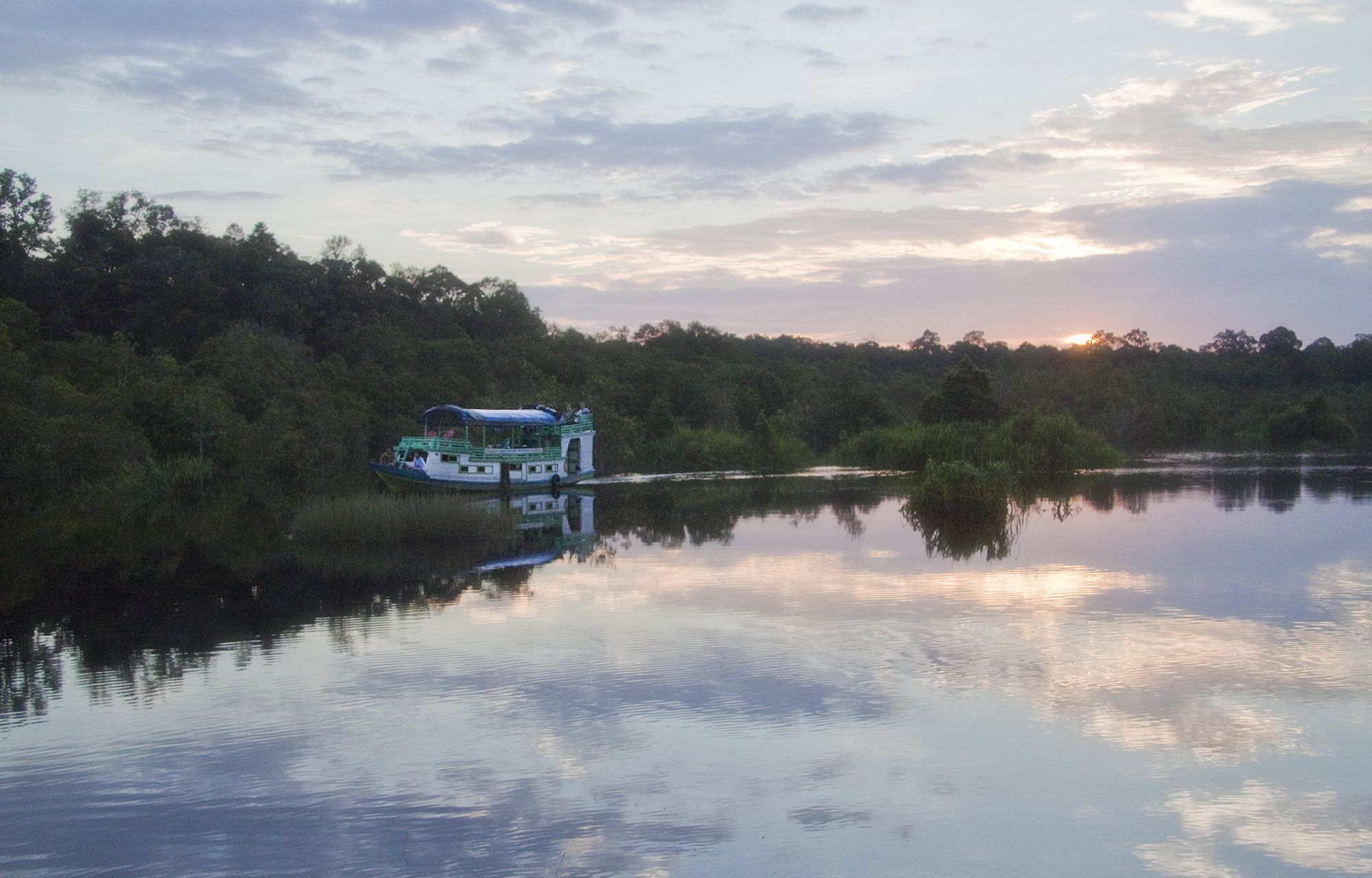 Central Kalimantan (Borneo), Indonesia